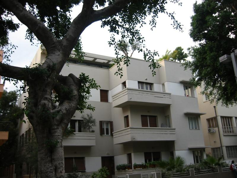 אחד המבנים המשופצים בשדרות רוטשילד